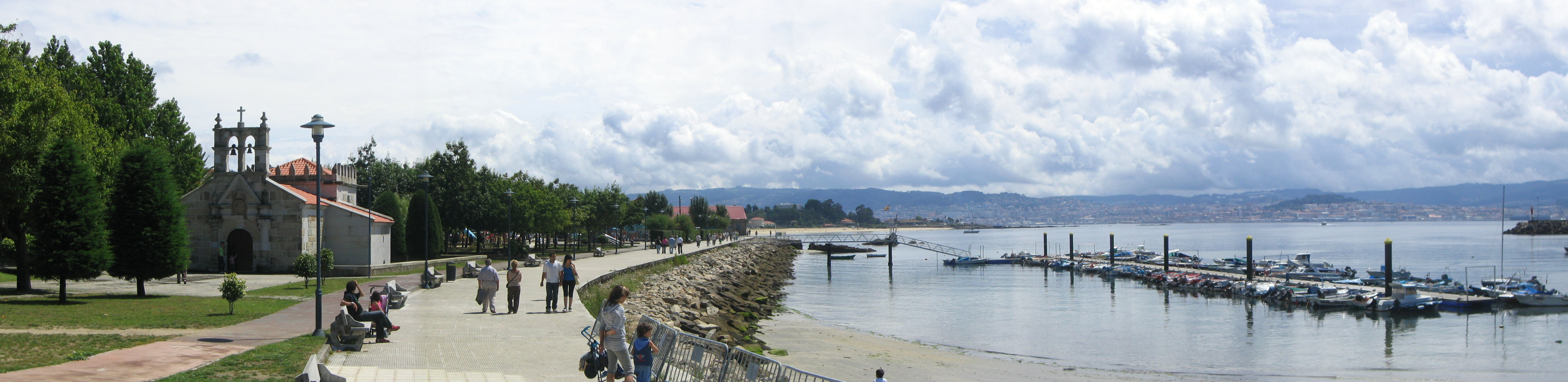 Cangas do Morrazo, Jardines del Señal. Pontevedra Galicia España.